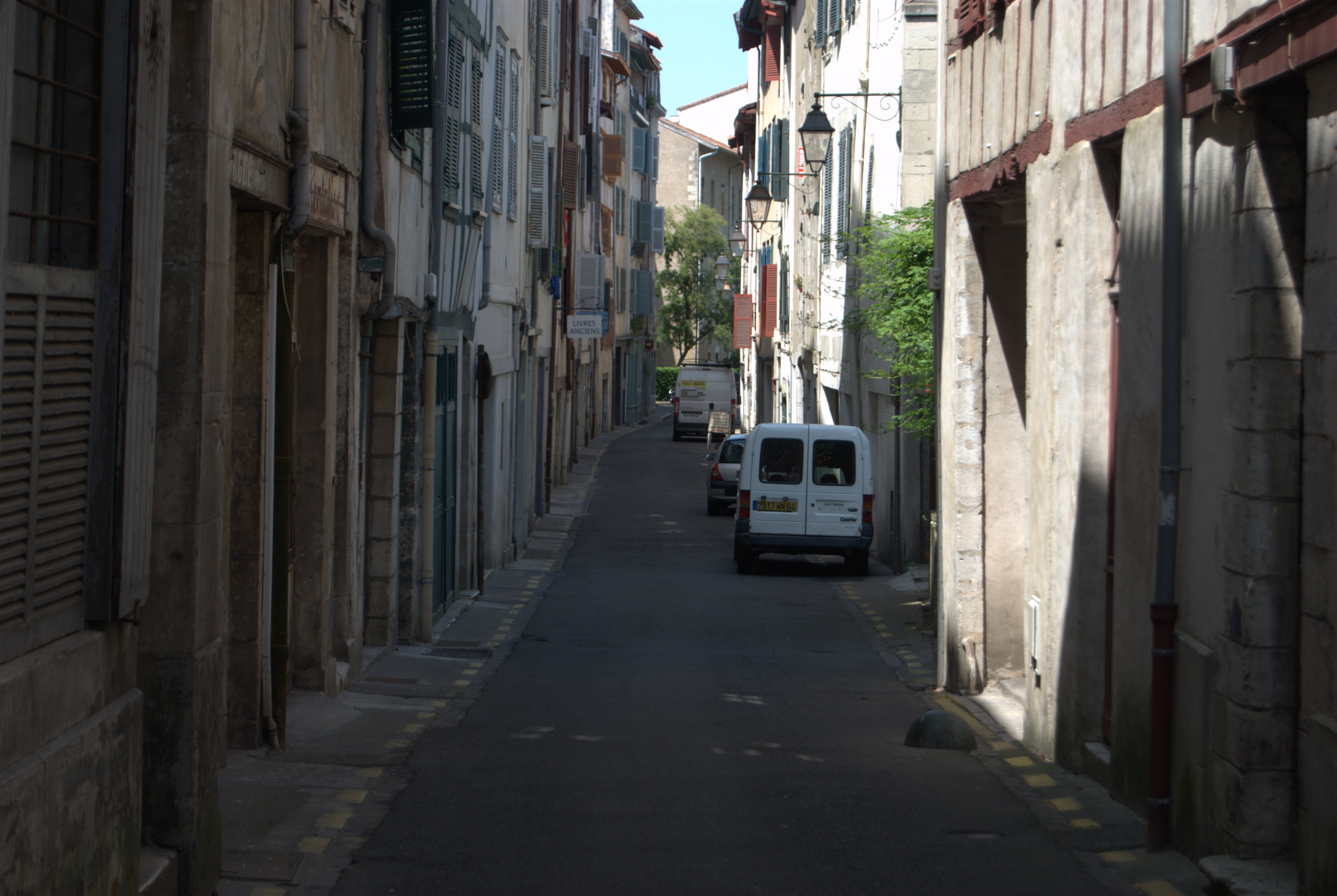 La rue des Faures, Bayonne.